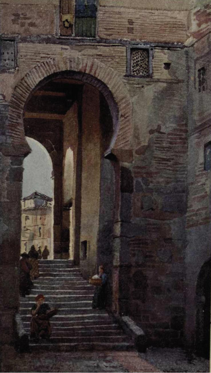 Grabado de la puerta del Zocodover del Toledo